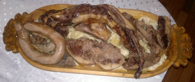 Бешбармак по-кокшетауски